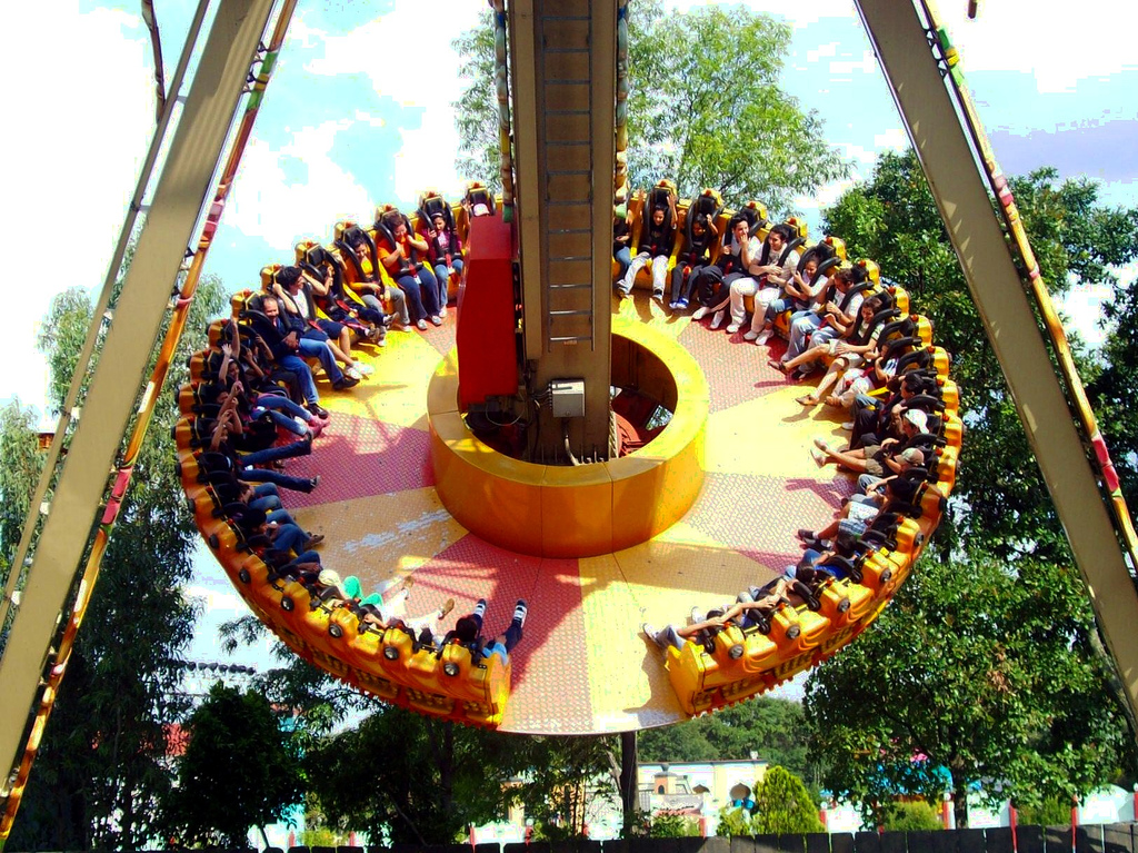 Fotografía de juego mecánico ("Vudú").Se encuentra dentro del parque temático Six Flags México. La fotografía pretende mostrar el juego y tiene como bojetivo illustrar diversos artículos de Wikipedia.